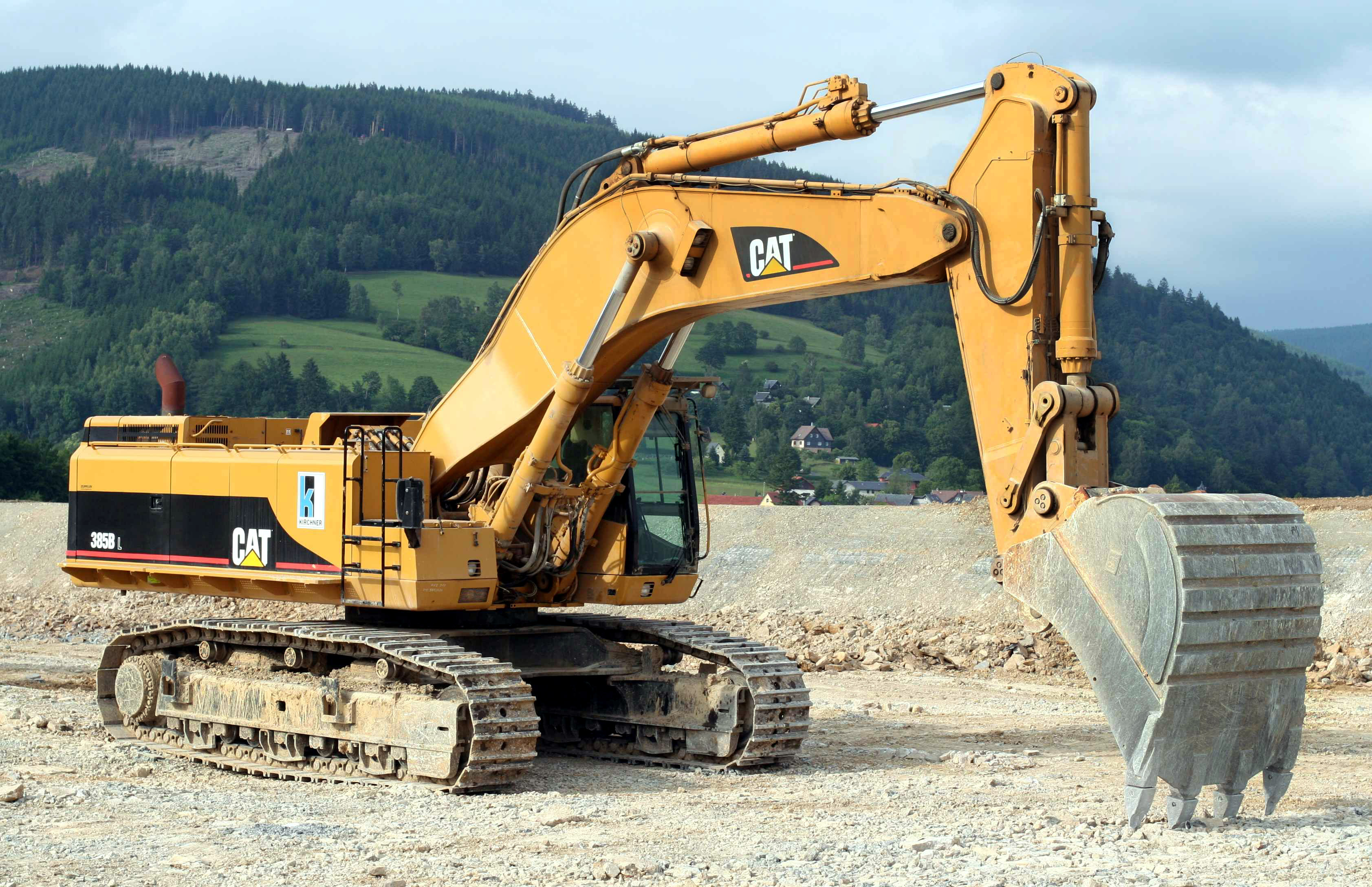 CAT 385 Raupenbagger